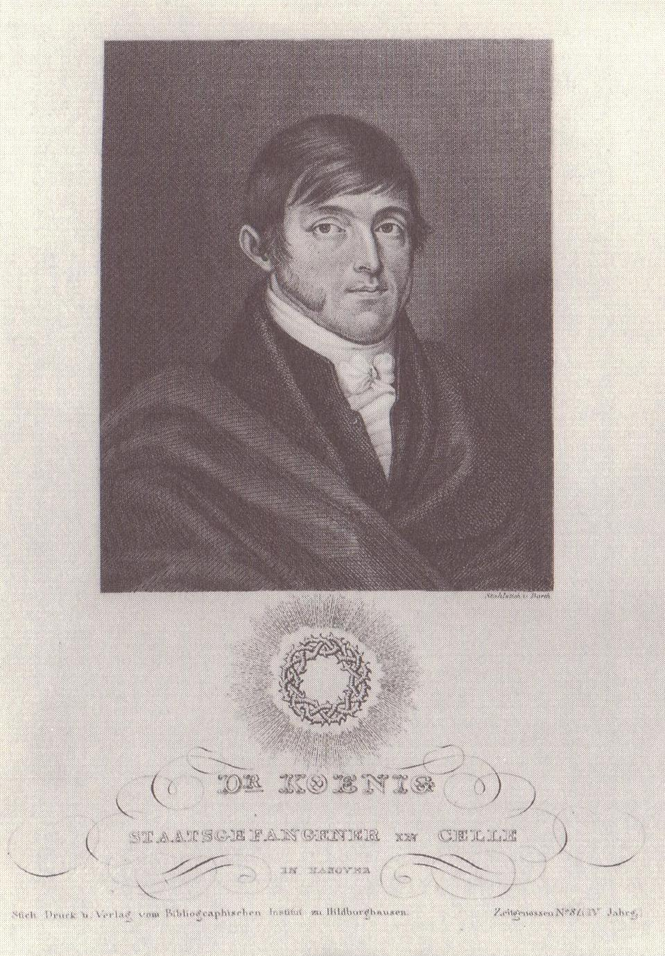 Georg Friedrich König (1781-1848), Rechtsanwalt in Osterode, Verfasser der Schrift Anklage des Ministeriums Münster vor der öffentlichen Meinung (1831), politischer Gefangener in Emden